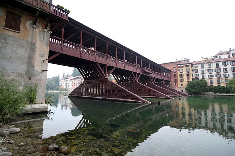 Ponte degli alpini - Bassano del grappa - Province de Vicenza La particularité de ce pont est d'être en bois.